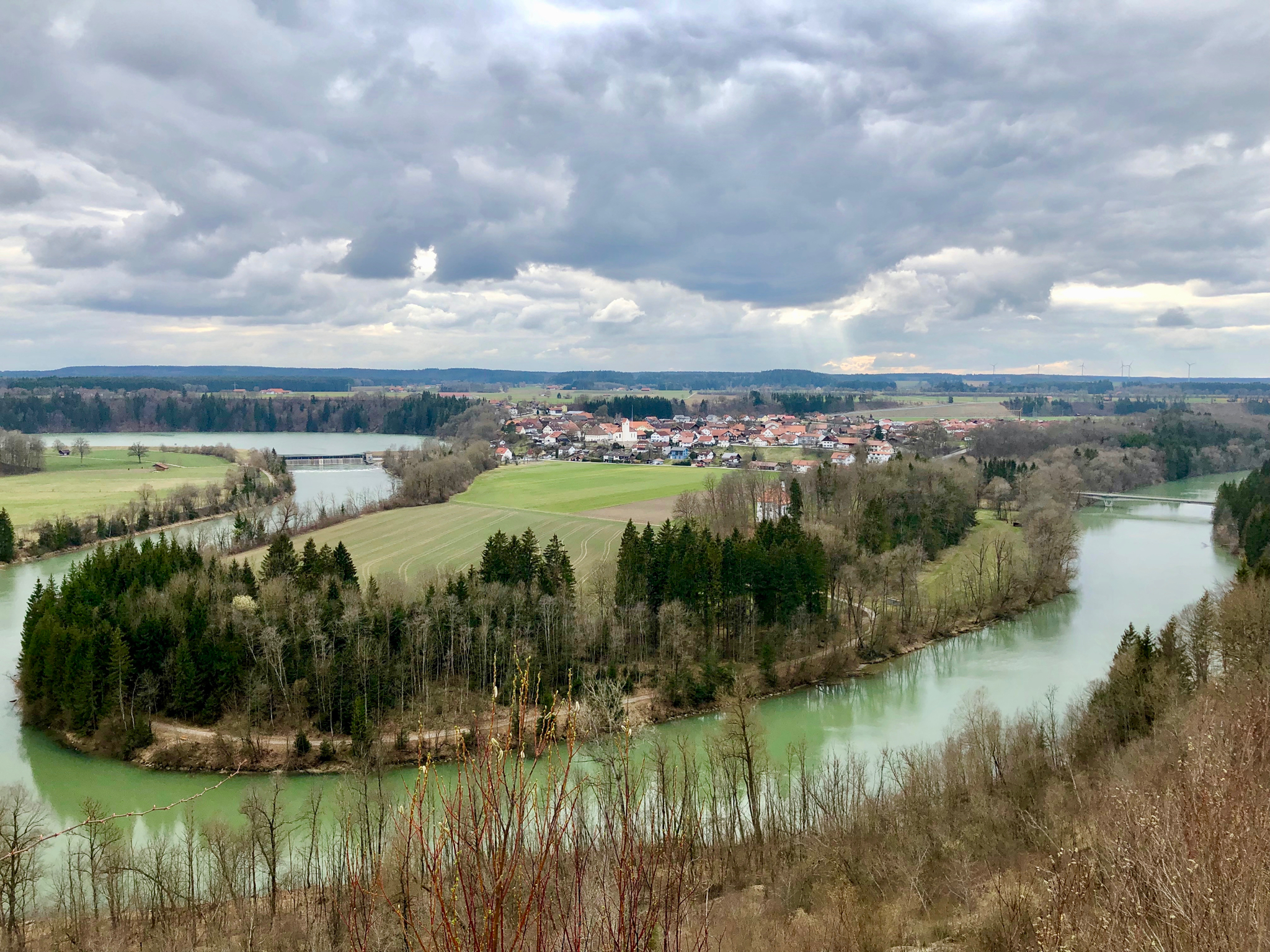 Blick auf den Ortsteil Epfach der Gemeinde Denklingen vom gegenüberliegenden Lechhochufer, Landkreis Landsberg am Lech, Bayern, Deutschland